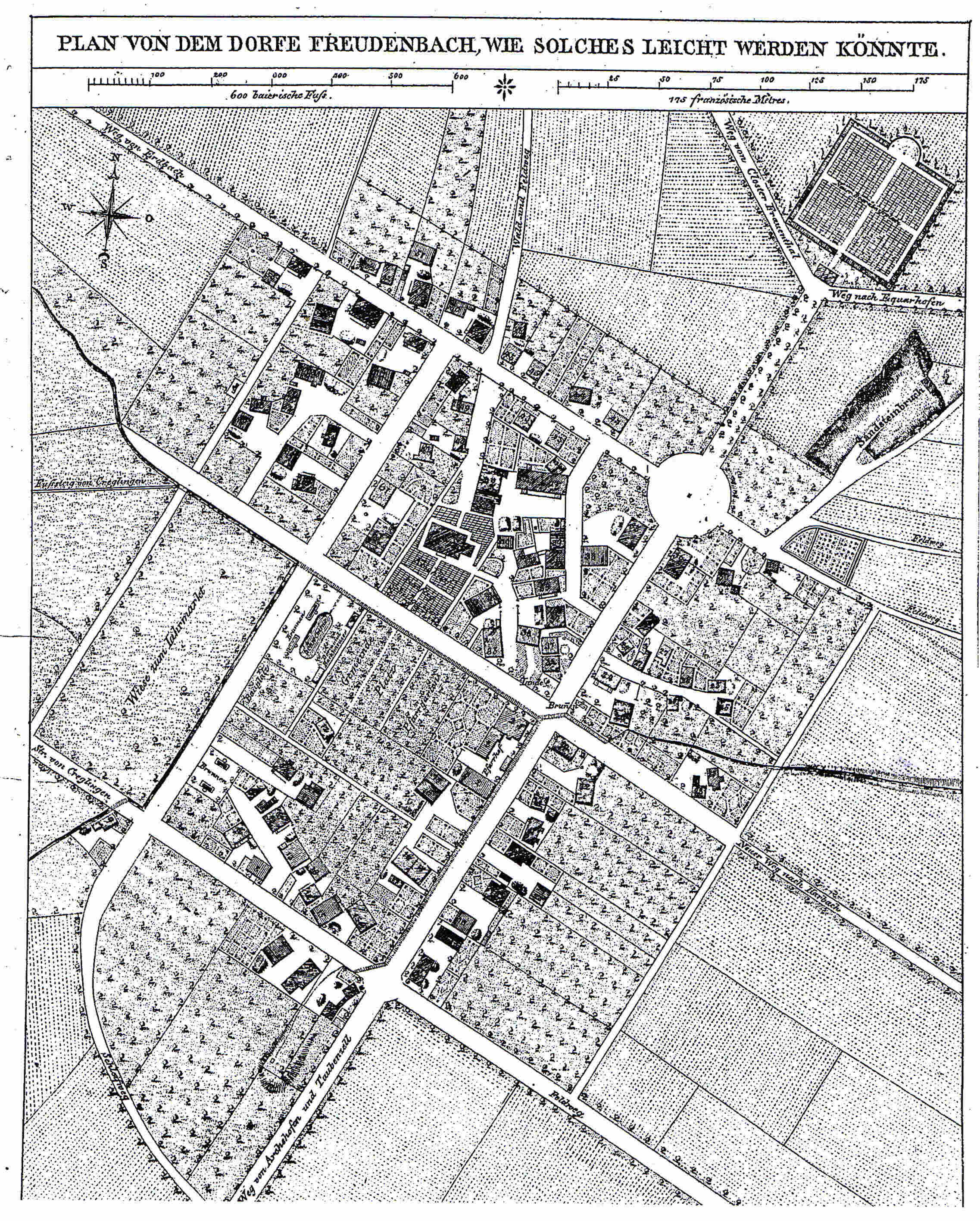 Neuplanung des Ortes Freudenbach aus Monatsblatt für Bauwesen und Landesverschönerung